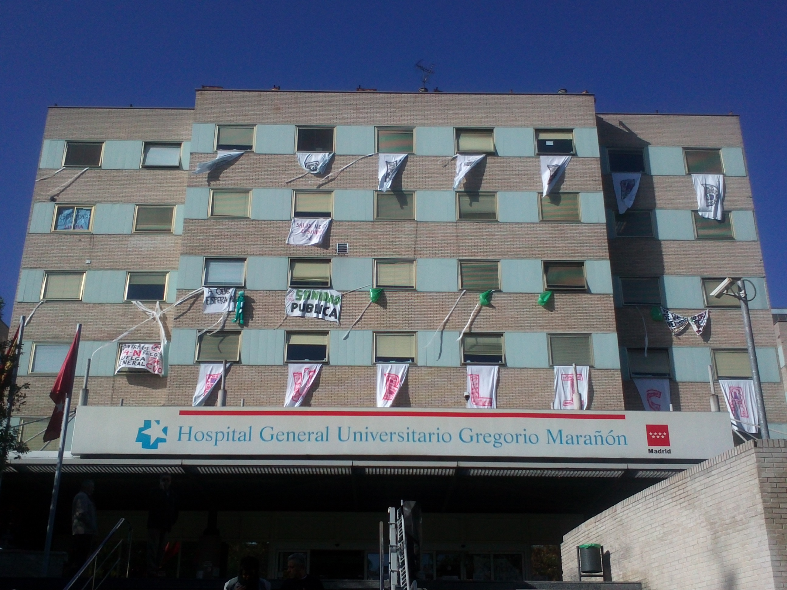 Hospital Gregorio Marañon (11:20)